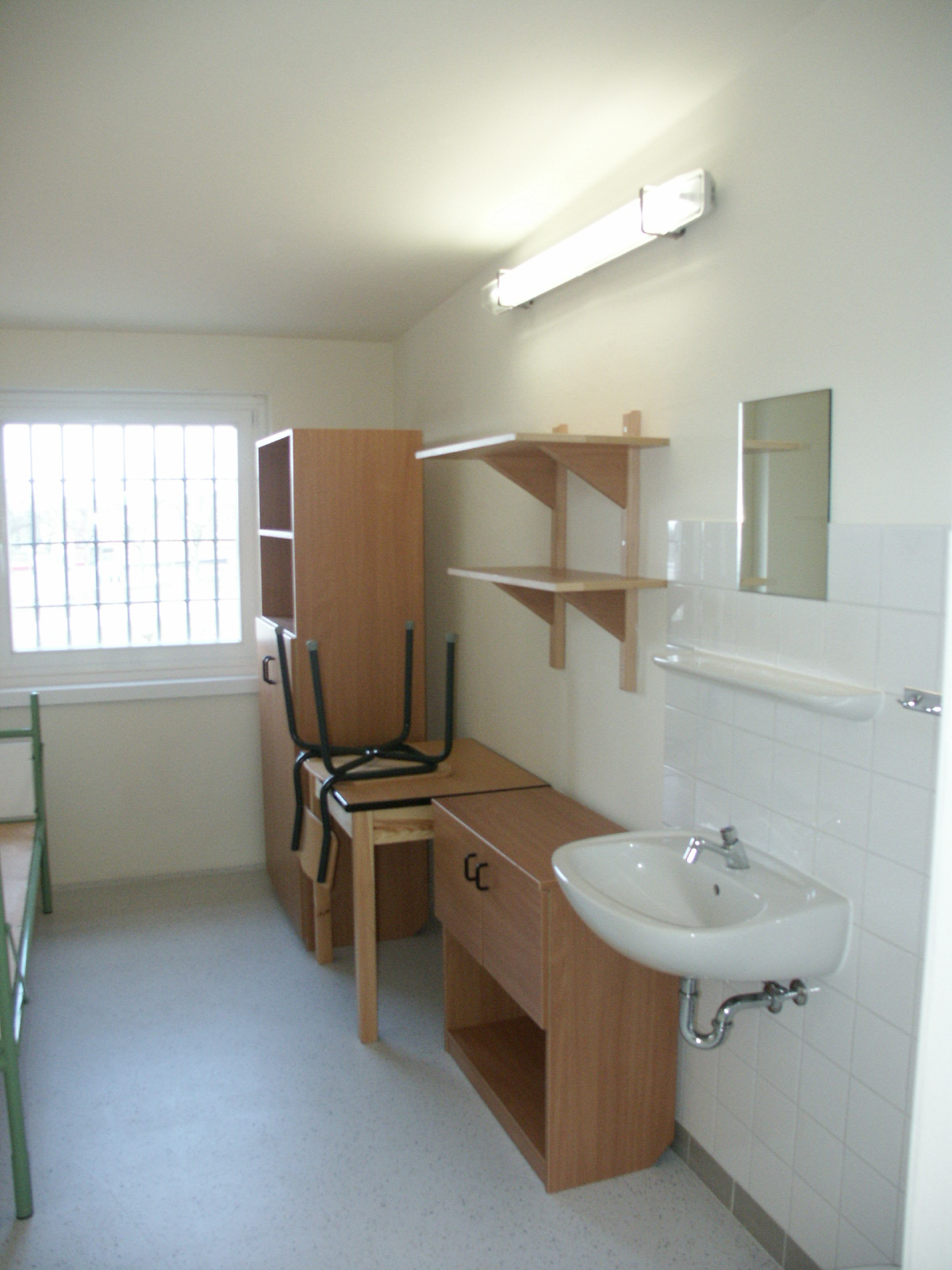 Haftraum (renoviert) in Santa Fu, Hamburg (Pressetermin 7.4.2006)